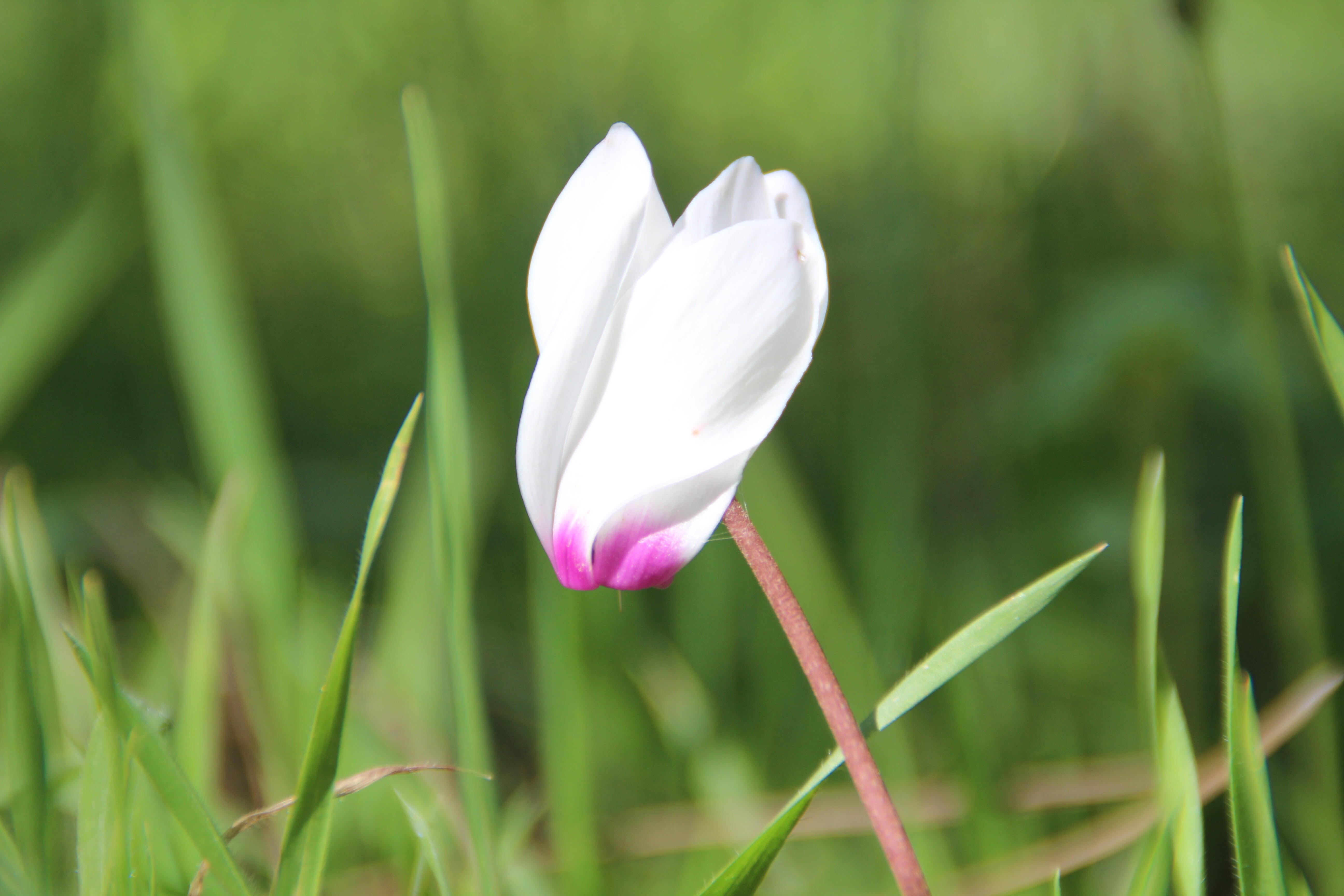 פרח רקפת.